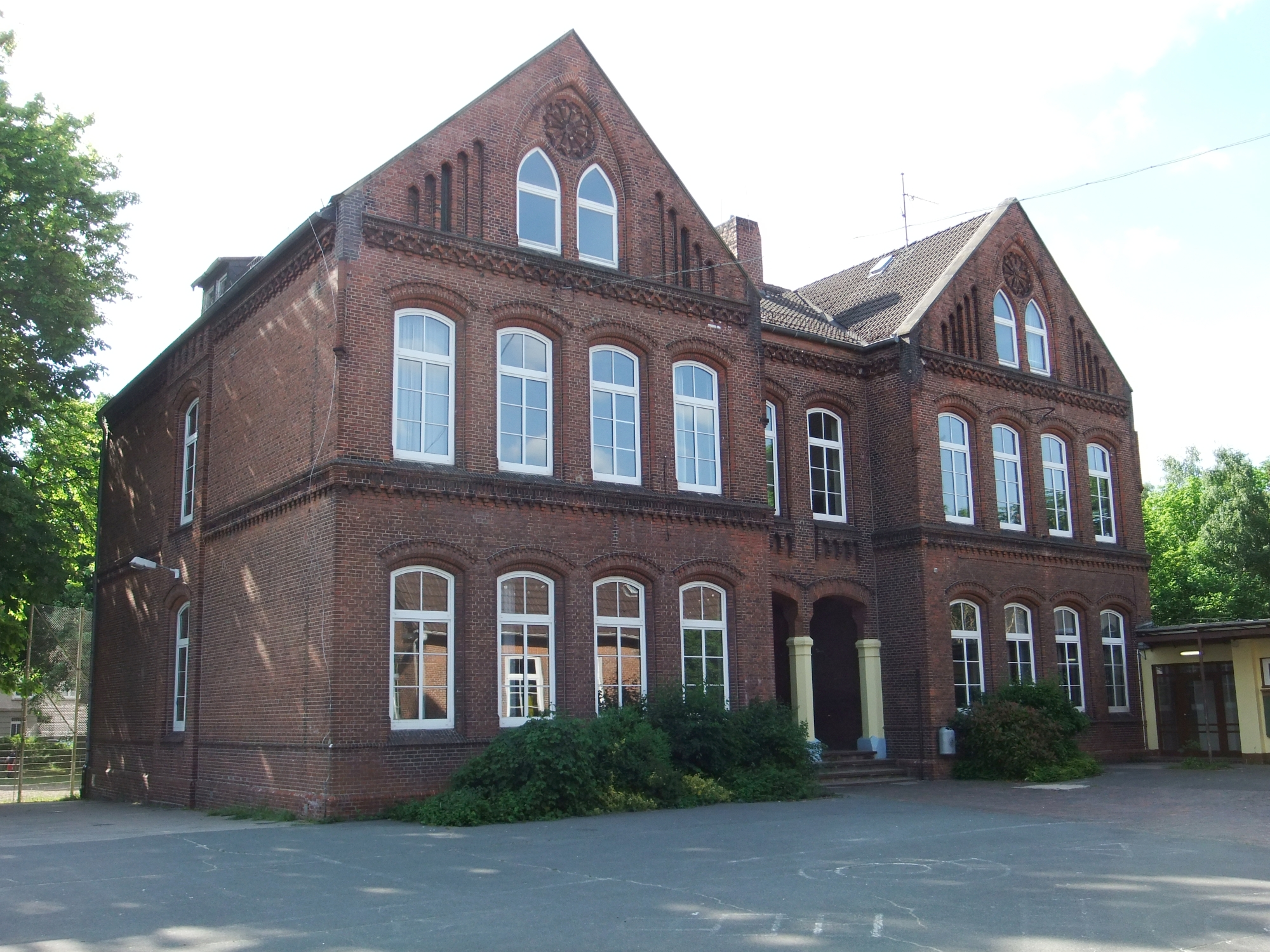 Reformierte Schule, Schulhaus in Bremerhaven, Lange Straße 88.Das abgebildete Objekt ist ein geschütztes Kulturdenkmal in der Freien Hansestadt Bremen, mit der Nr. 1876 beim Landesamt für Denkmalpflege registriert.